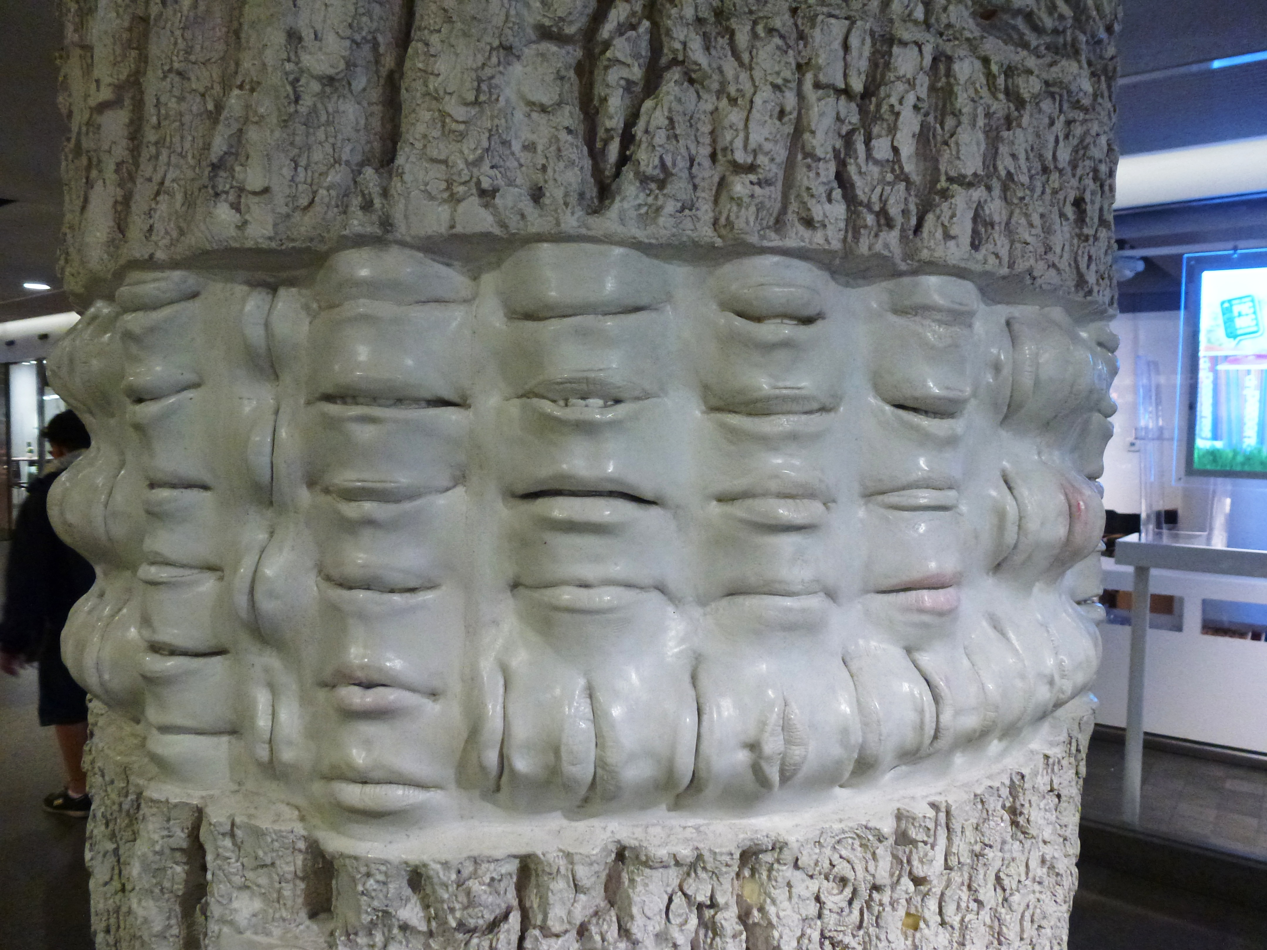 Eva Ziggy Berglunds pelarskulptur "Avtryck" Hornstulls tunnelbana (detalj)